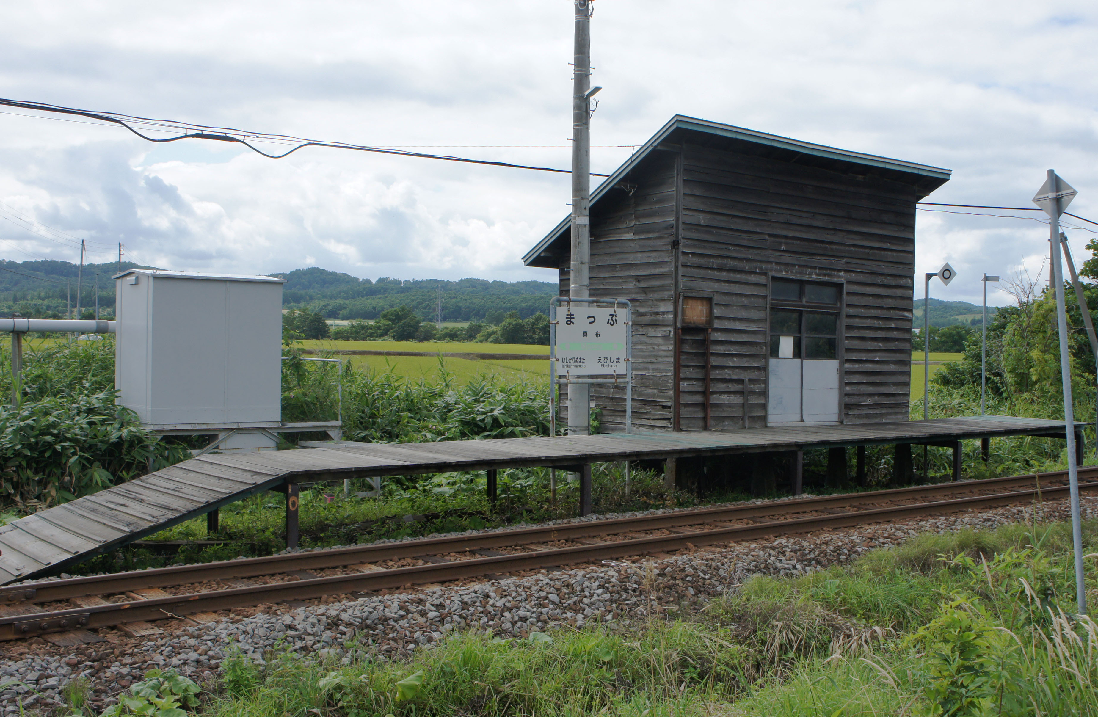 JR留萌本線・真布駅全体